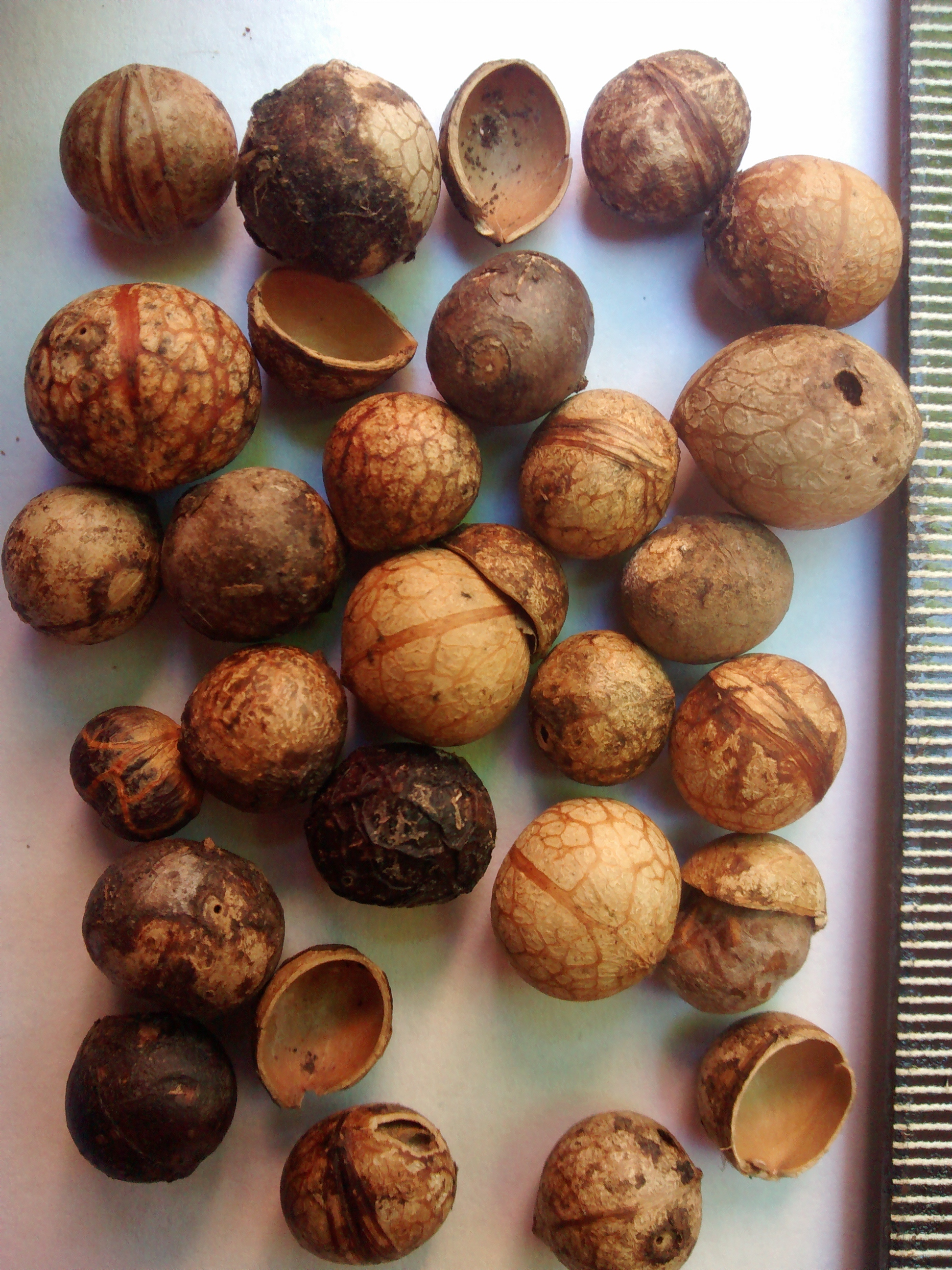 Sementes de Prunus myrtifolia